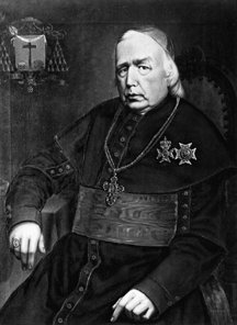 Mgr. Zwijsen, 1793 died 1877 Archbisshop of Den Bosch in the Netherlands